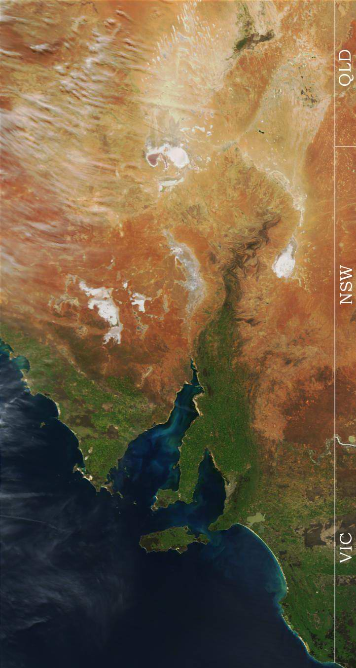 Satelita foto de orienta Suda Aŭstralio Fonto: la angla vikipedio (kie poste alŝutiĝis pli malgranda versio kiu nun haveblas en la komunejo) Ĉi-foto estas publika havaĵo ĉar ĝi kreiĝis fare de NASA. En la vikimedia komunejo ekzistas la similaspekta foto :dosiero:Eastern_South_Australia_Satellite_Photo.jpg kiu tamen nur konsistas 319 × 598 rastrumeroj, kaj havas dosieran grandecon de nur 41 KB. Tial ĝi ne identas, sed konsiderindas malpli detala, kaj la loka kopio de la NASA-foto restu. ThomasPusch (diskuto) 13:59, 30 dec. 2016 (UTC)